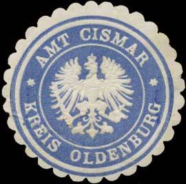 Sealing stamp Title: Amt Cismar Kreis Oldenburg Description: blau, weiß, geprägt Place: Cismar size: 3 cm